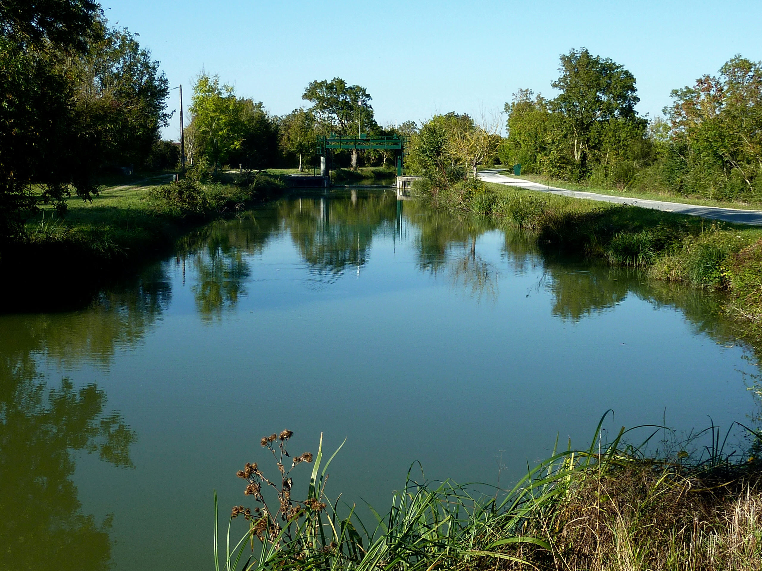 Canal de Charras vanne de Suze ou vanne de la Pelle Rouge - Ciré d'Aunis Charente Maritime France